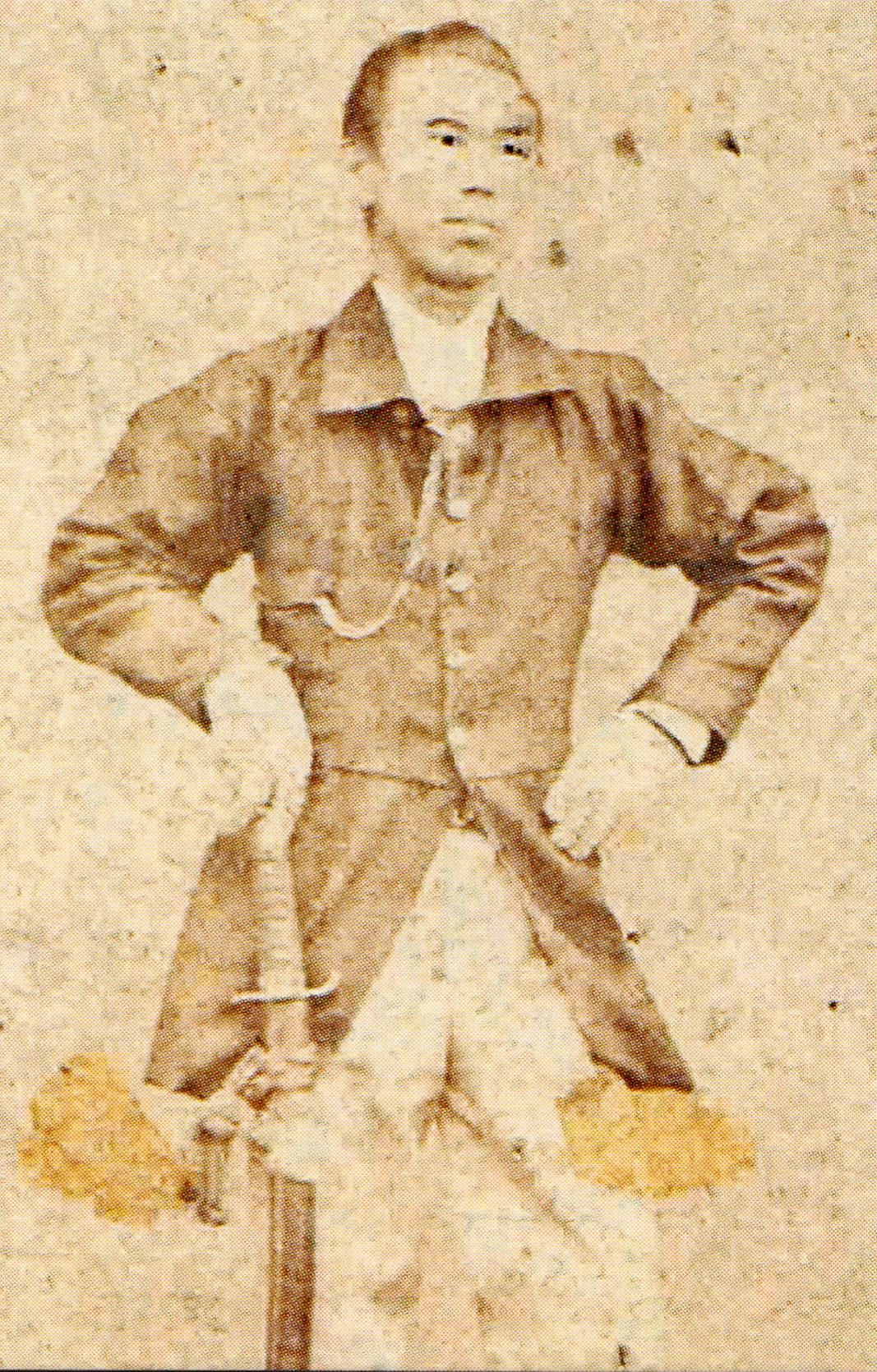 赤松小三郎の肖像写真。